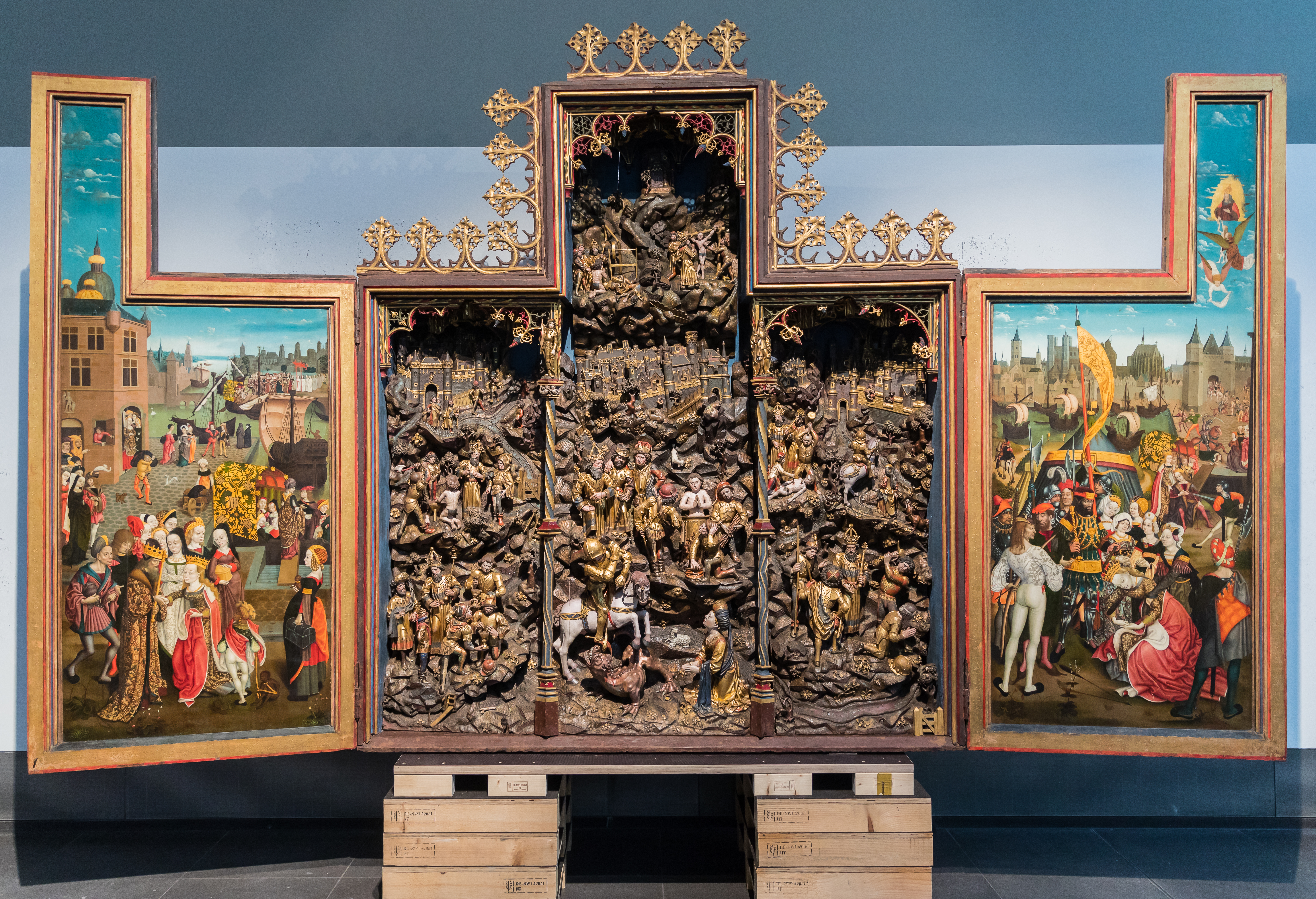 Georgsaltar St. Nicolai Kalkar. Er wurde im Museum Schnütgen umfassend restauriert und ist Teil der Ausstellung „Arnt der Bilderschneider – Meister der beseelten Skulpturen“ vom 2. April bis 5. Juli 2020